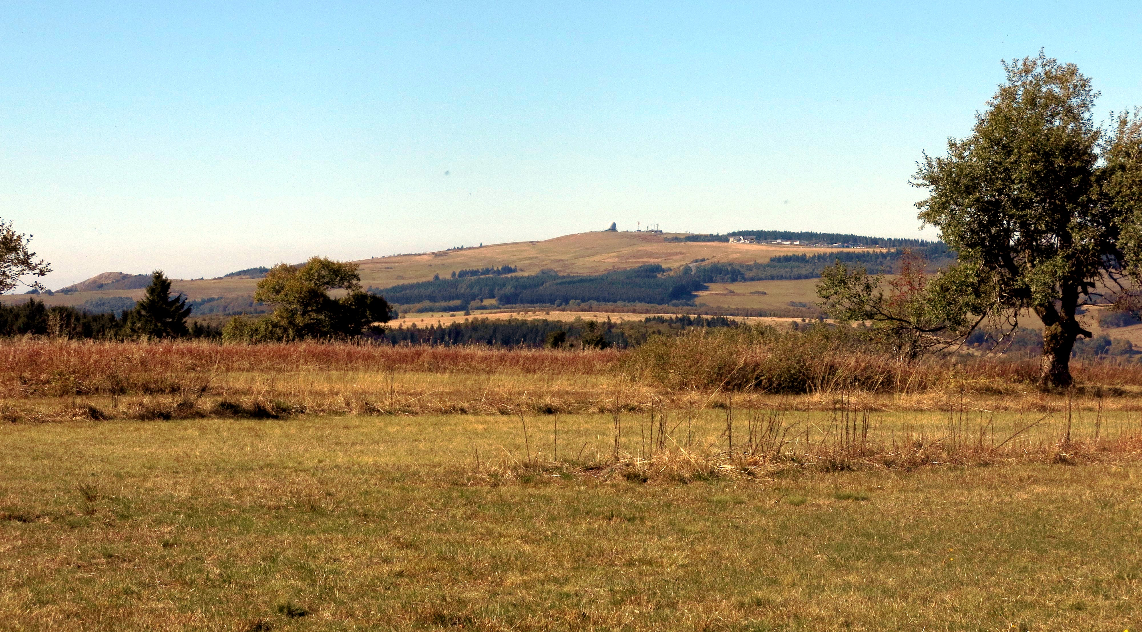 In der südlichen Langen Rhön - Blick vom Heidelstein auf die Wasserkuppe